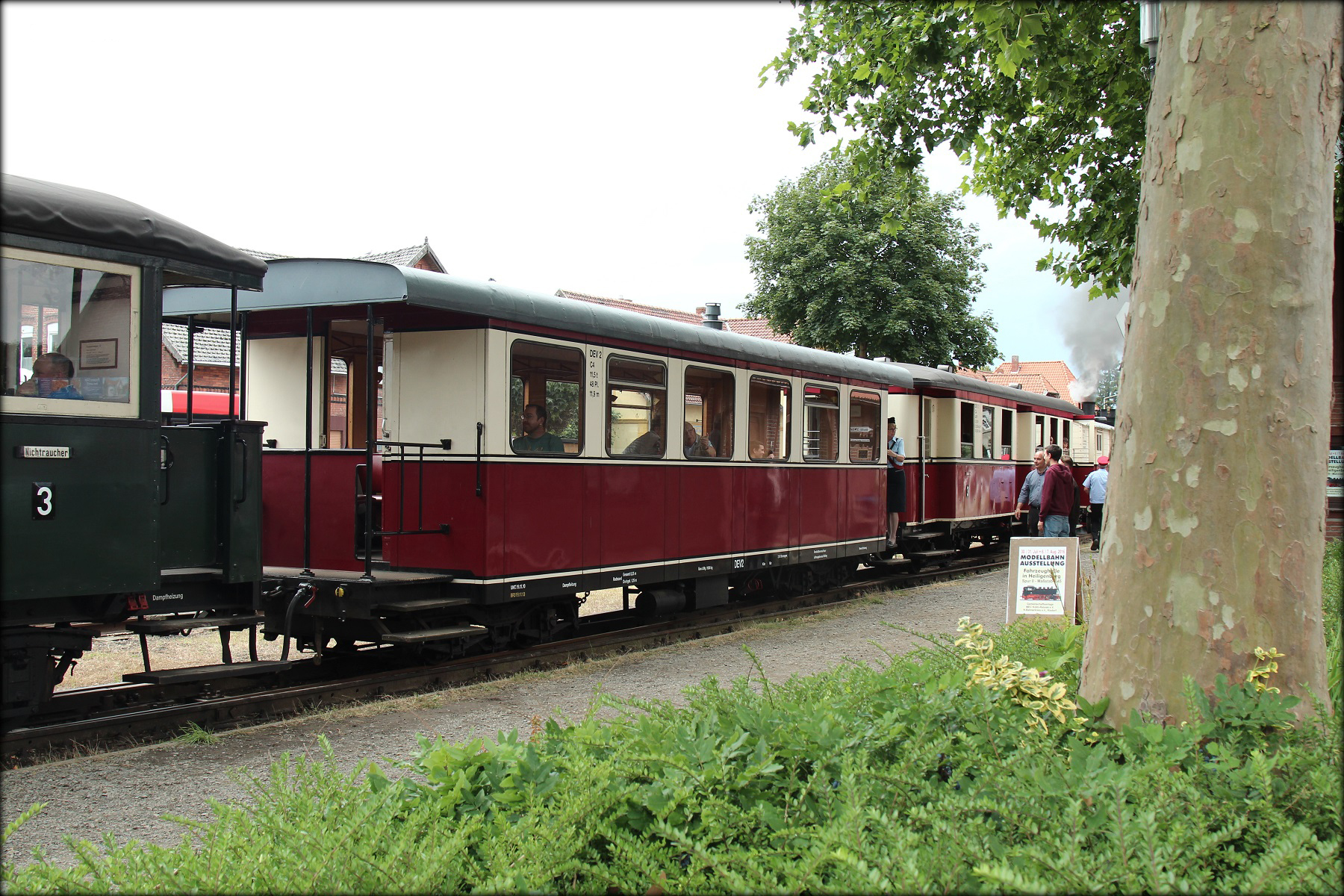 Wagen "2 der Geilenkirchener Kreisbahn. Modernisierung (Wagenkasten / -aufbau) bei Talbot in Aachen. Später Kleinbahn Hoya-Syke-Asendorf. Deutscher Eisenbahn Verein, Asendorf 2016.